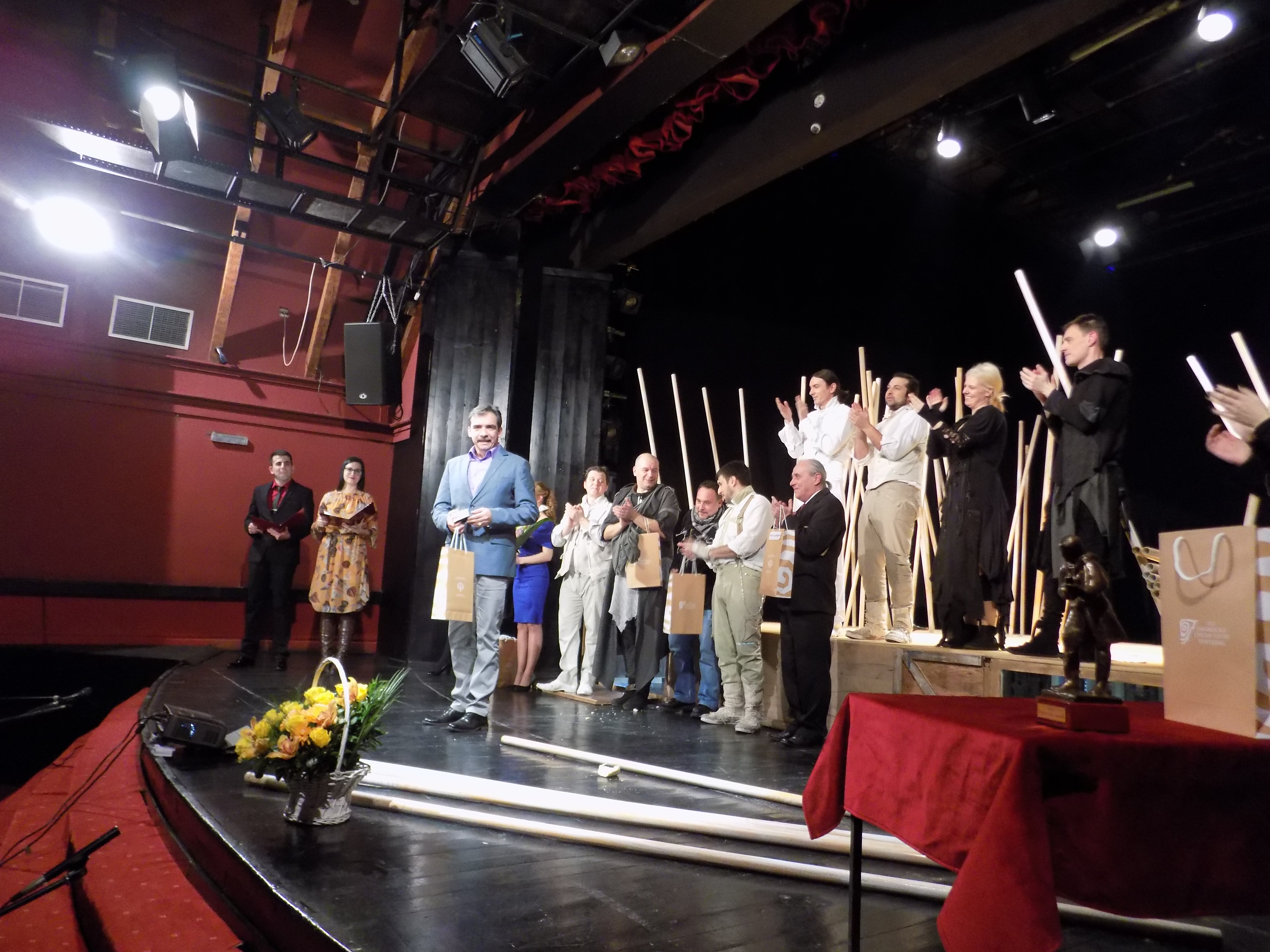 Миодраг Пејковић, добитник Прстена са ликом Јоакима Вујића